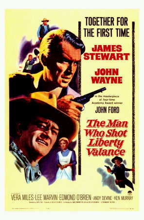 Cartel anunciador de la película The Man Who Shot Liberty Valance, dirigida en 1962 por John Ford y protagonizada por James Stewart y John Wayne